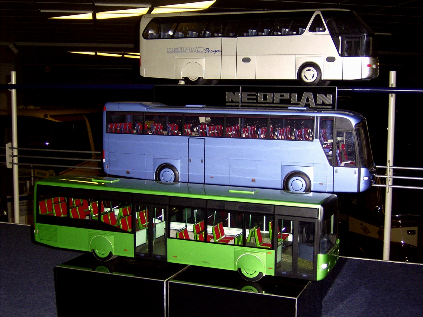 Modelle von Neoplan Starliner, Euroliner und Centroliner im Neoplan-Museum Stuttgart-Möhringen